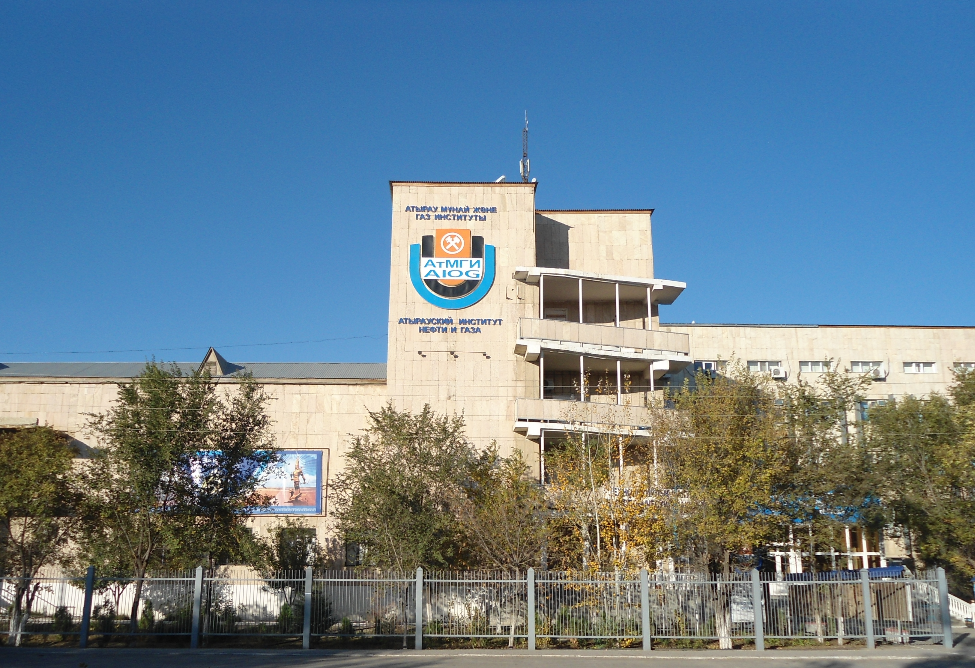 Атырау мұнай және газ институтының бас ғимараты